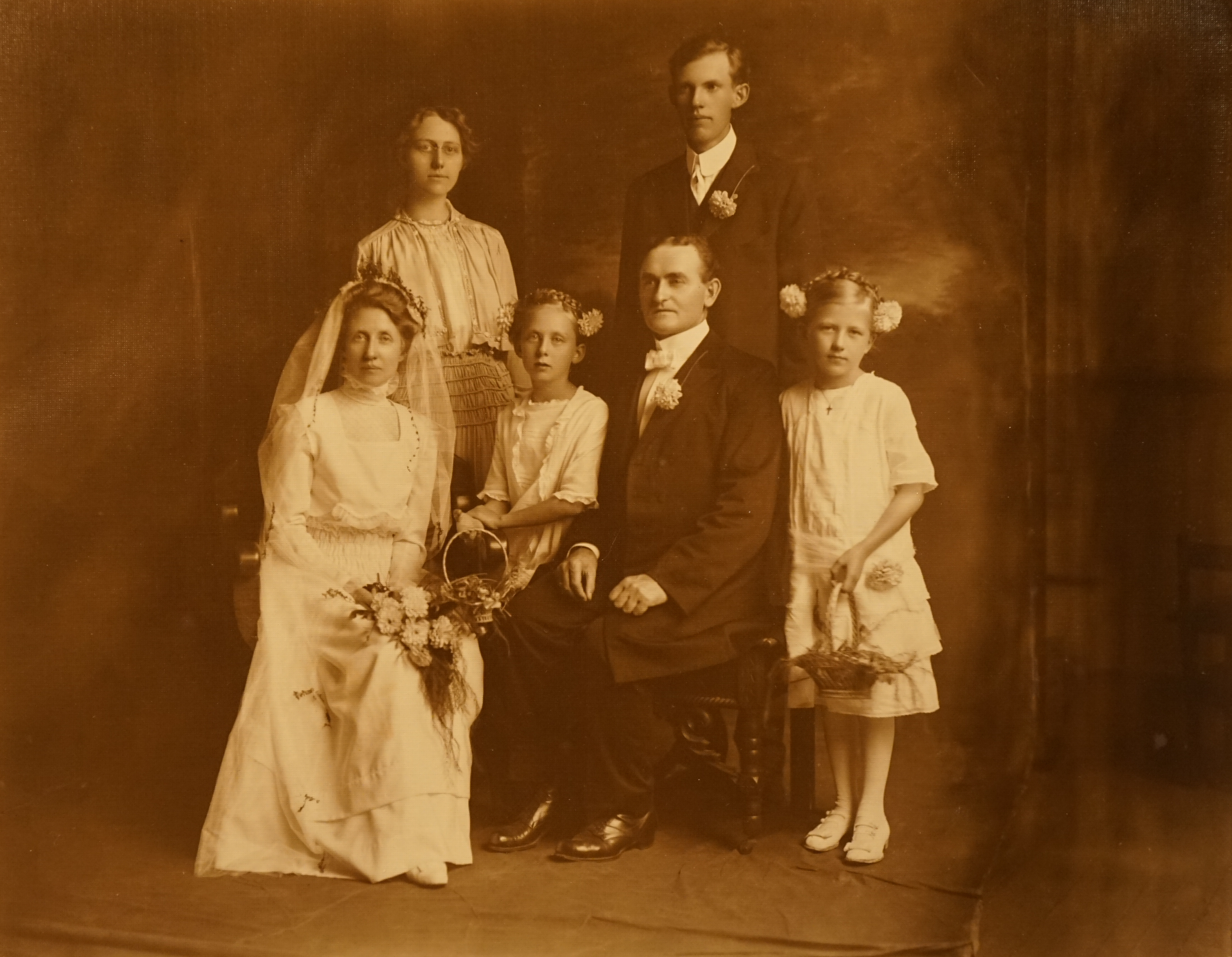 Eline og Mogens Uhrenholt. Bryllupsbillede, Cedar Falls, Iowa, 1915.